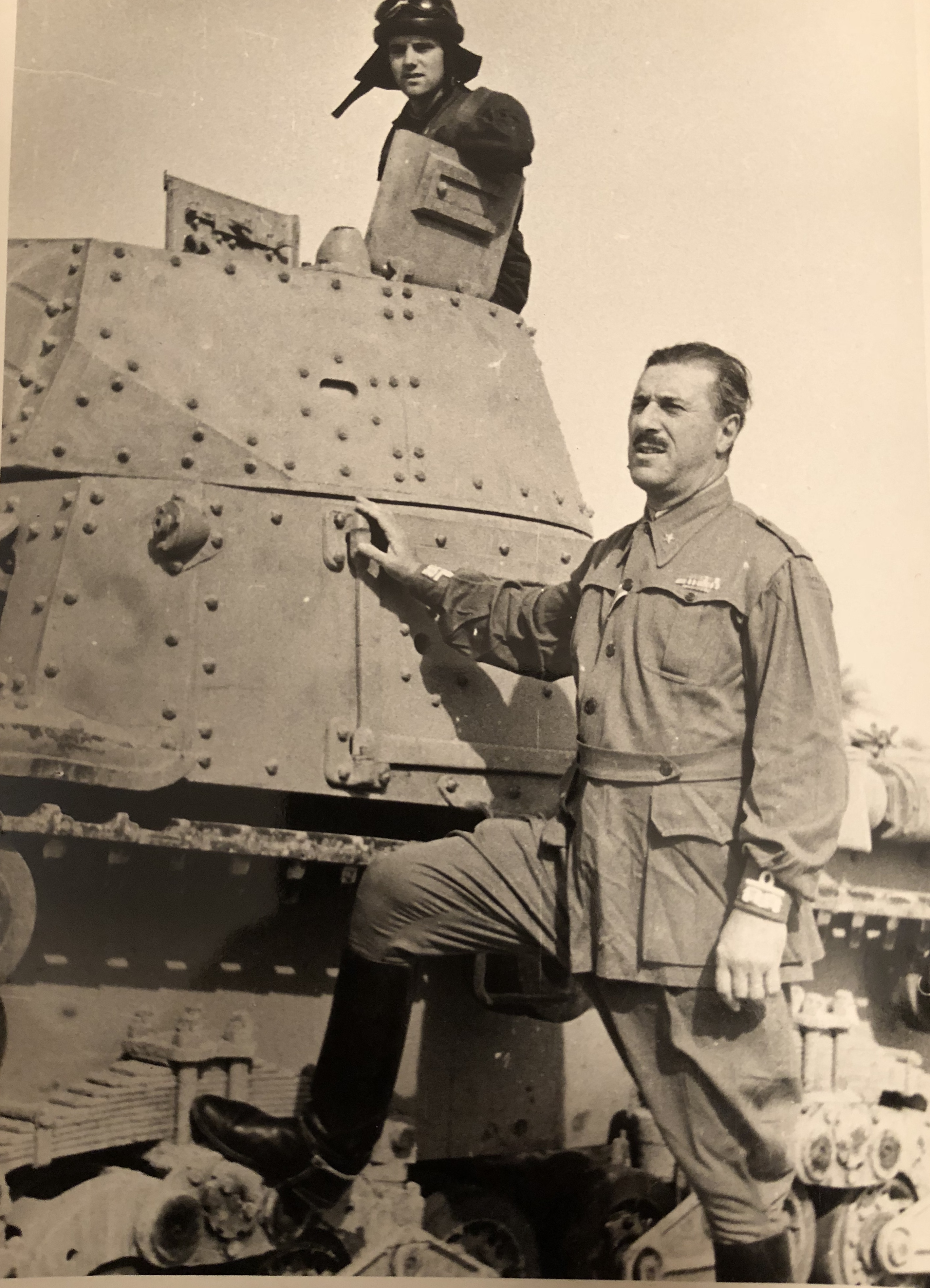 Generale Mario Balotta in Africa Settentrionale, Comandante della Divisione Ariete